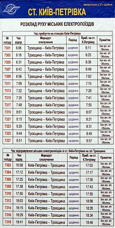 Платформа міської електрички Почайна